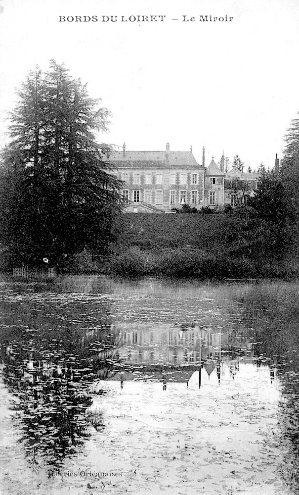 Orléans, Loiret, France : plan d'eau appelé « le Miroir », reflétant le château de La Source. Le Miroir se trouve sur le cours du Loiret, à 240 m en aval (sur la gauche de la photo) de la source "le Bouillon" et à quelques mètres en amont (à droite de la photo) de la source "l'Abîme".